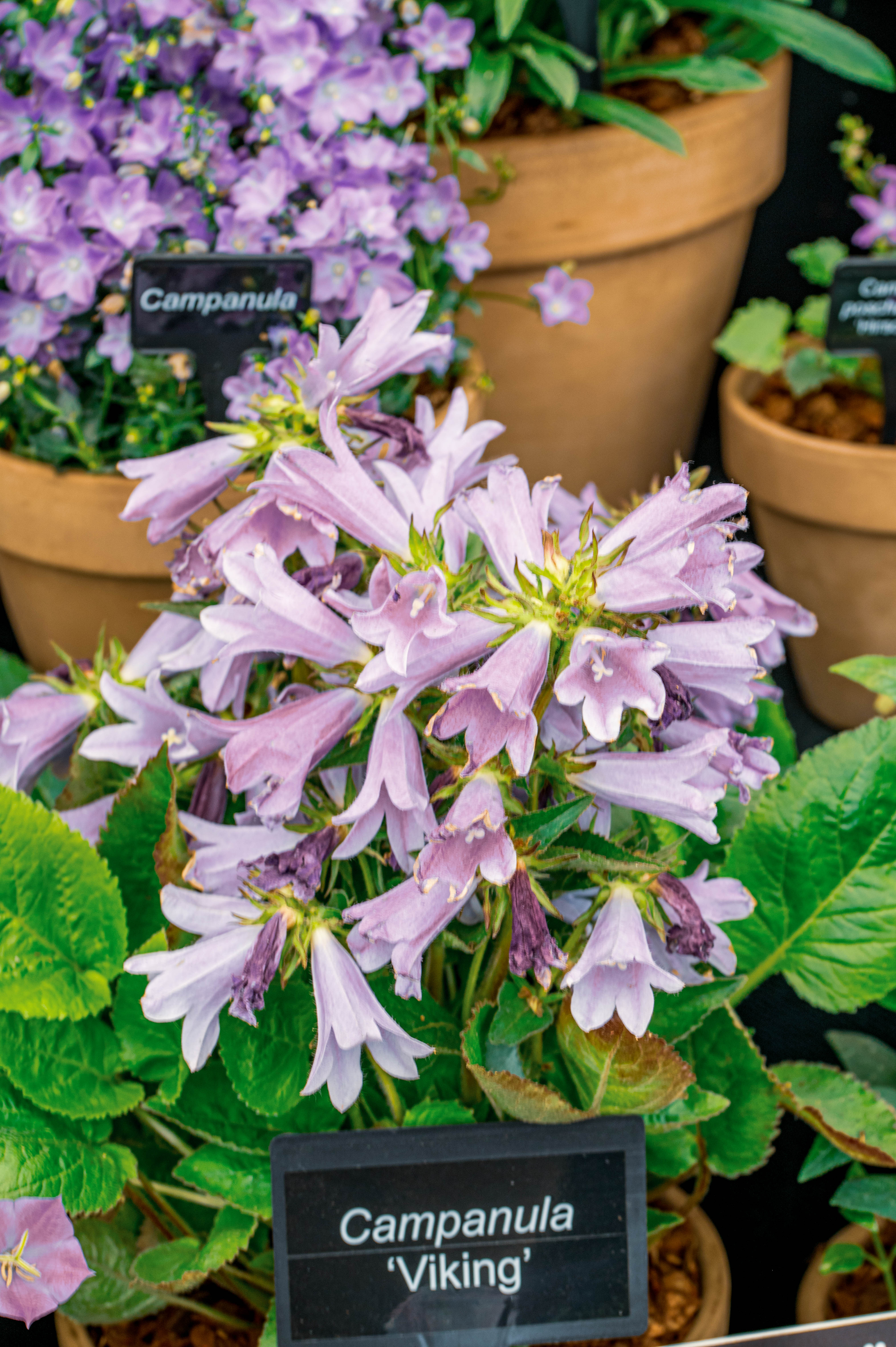 Campanula scheuchzeri